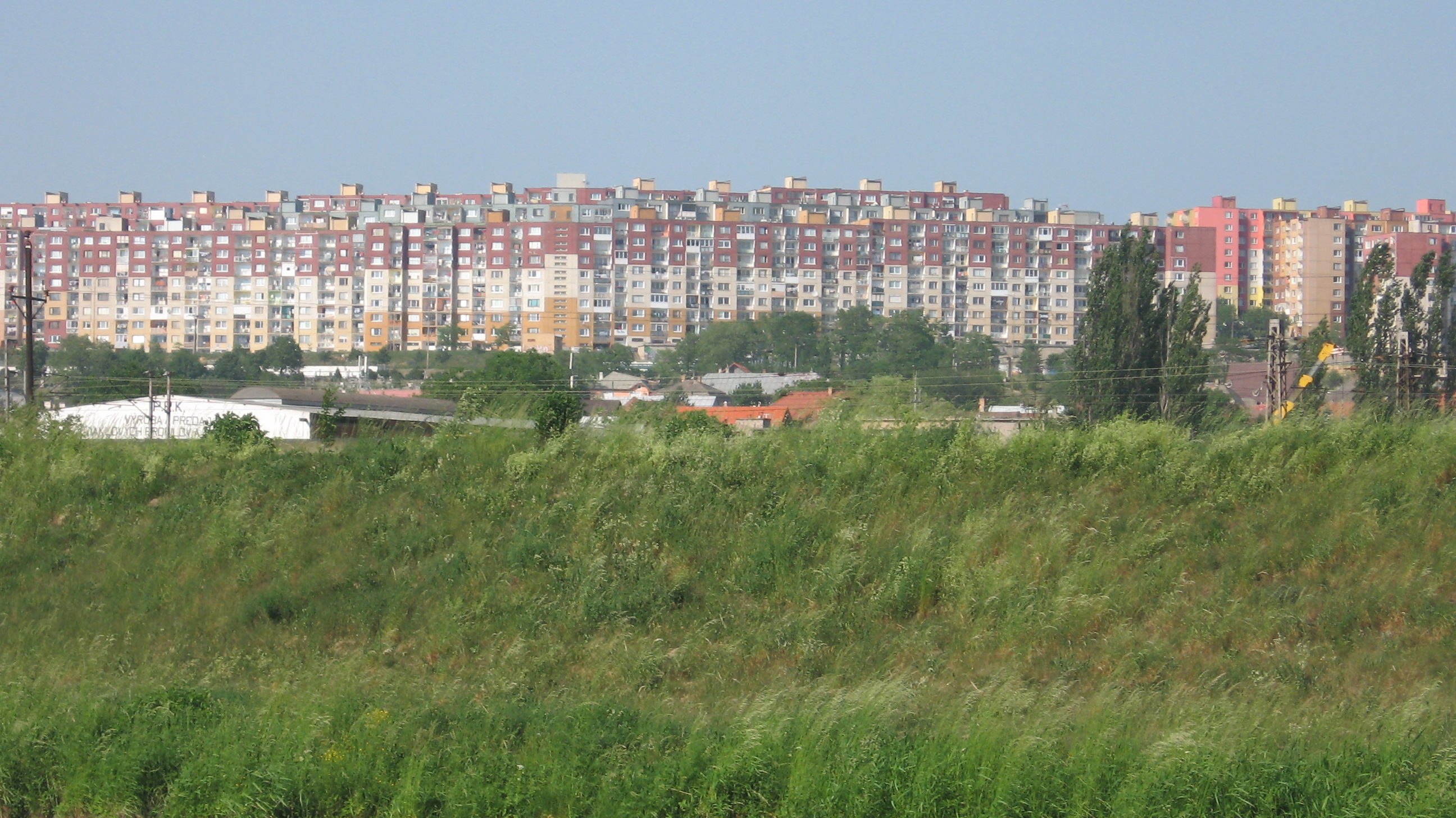 Sídlisko Ťahanovce sa malo rozprestierať aj na týchto lúkach a padnúť za obeť mu mala aj rovnomenná dedina.